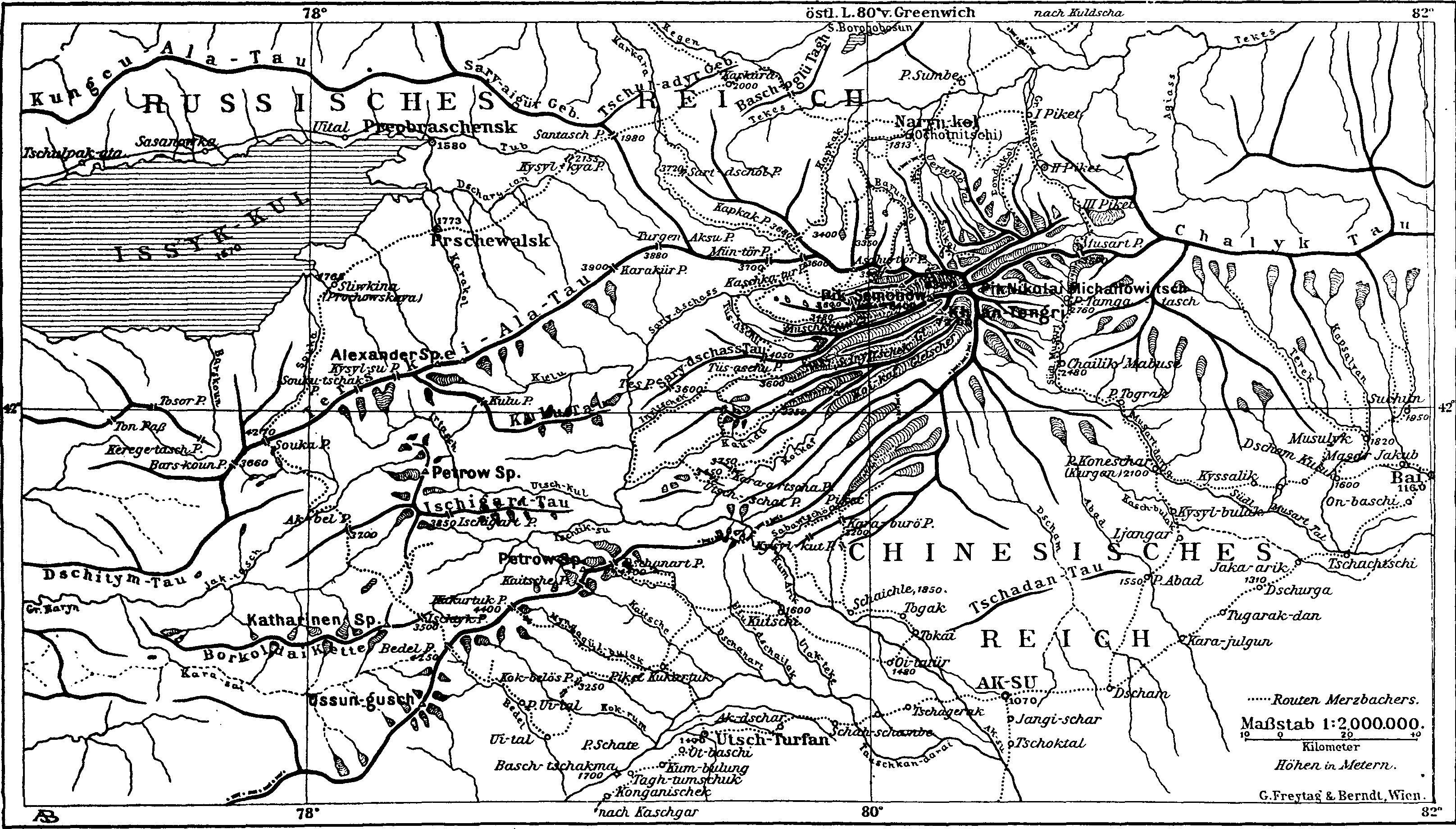 Kartenskizze des Tian-Schan aus Zeitschrift des Deutschen und Oesterreichischen Alpenvereins 1906 Band 37